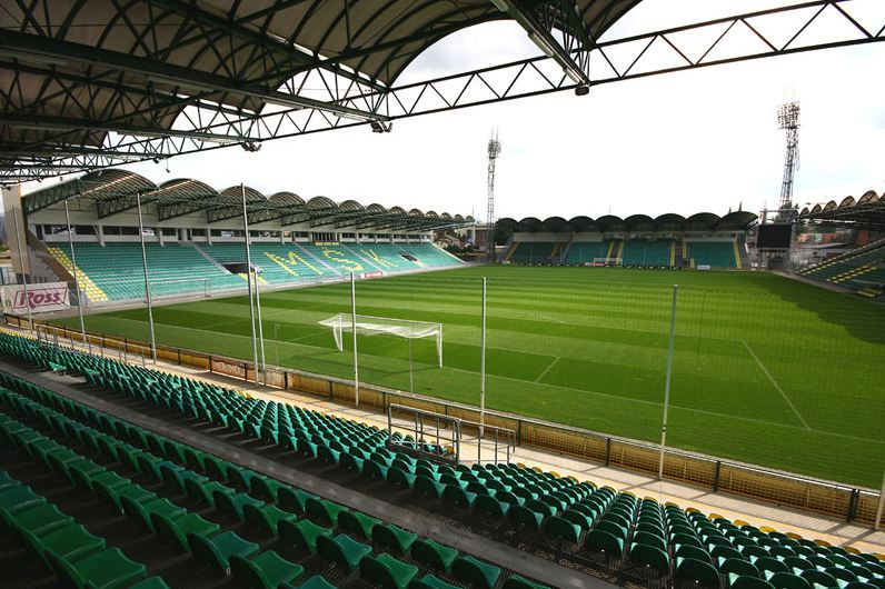 MŠK Žilina - Stadium